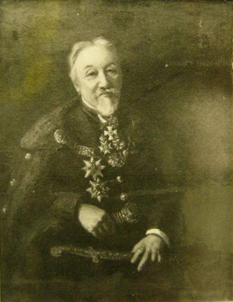 Konkoly-Thege Miklós magyar csillagász, meteorológus, az Magyar Tudományos Akadémia tagja, országgyűlési képviselő.